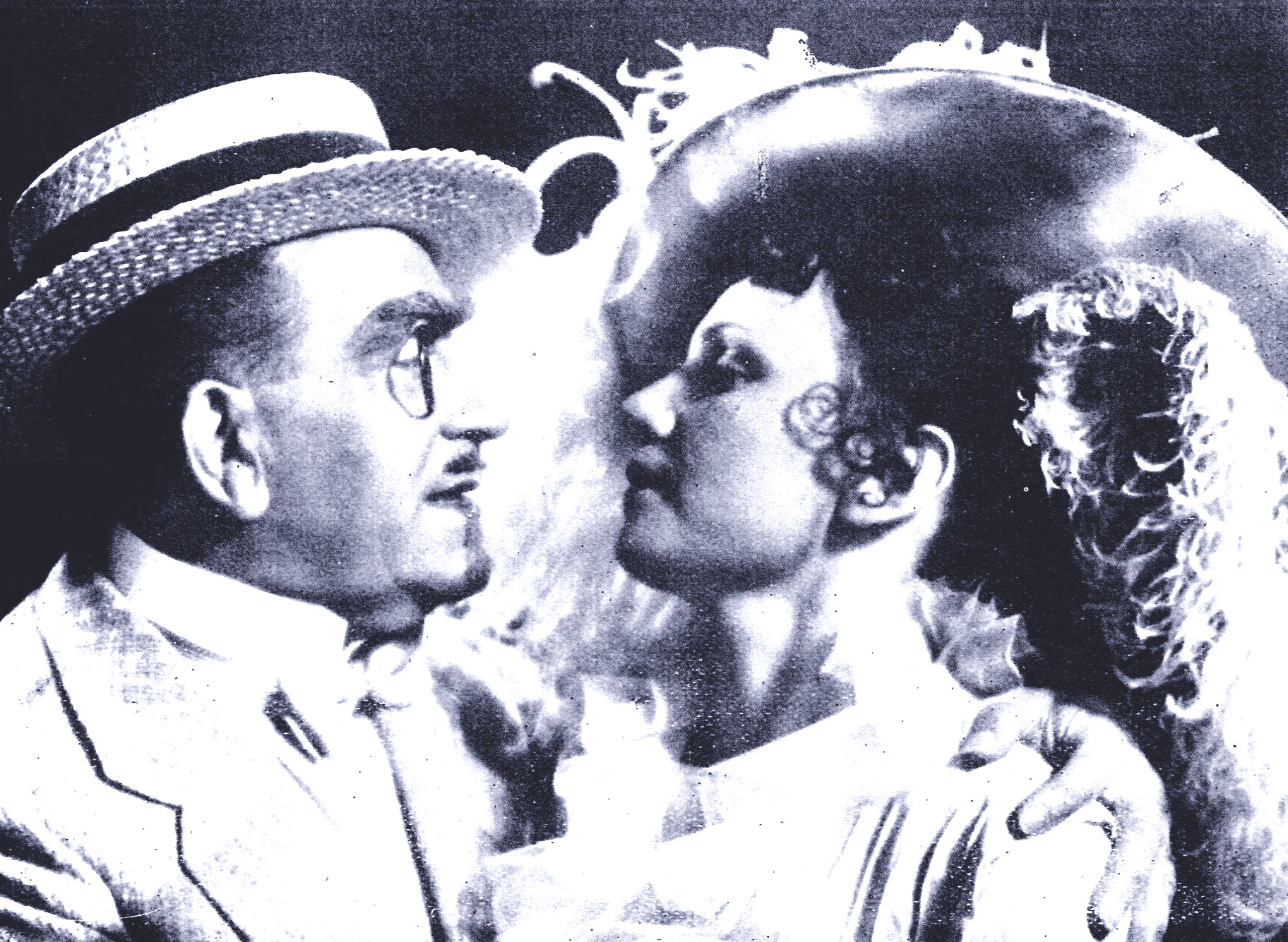 Armando Falconi e Hilda Springher in una scena di "E' tornato Carnevale" (Matarazzo, 1937)